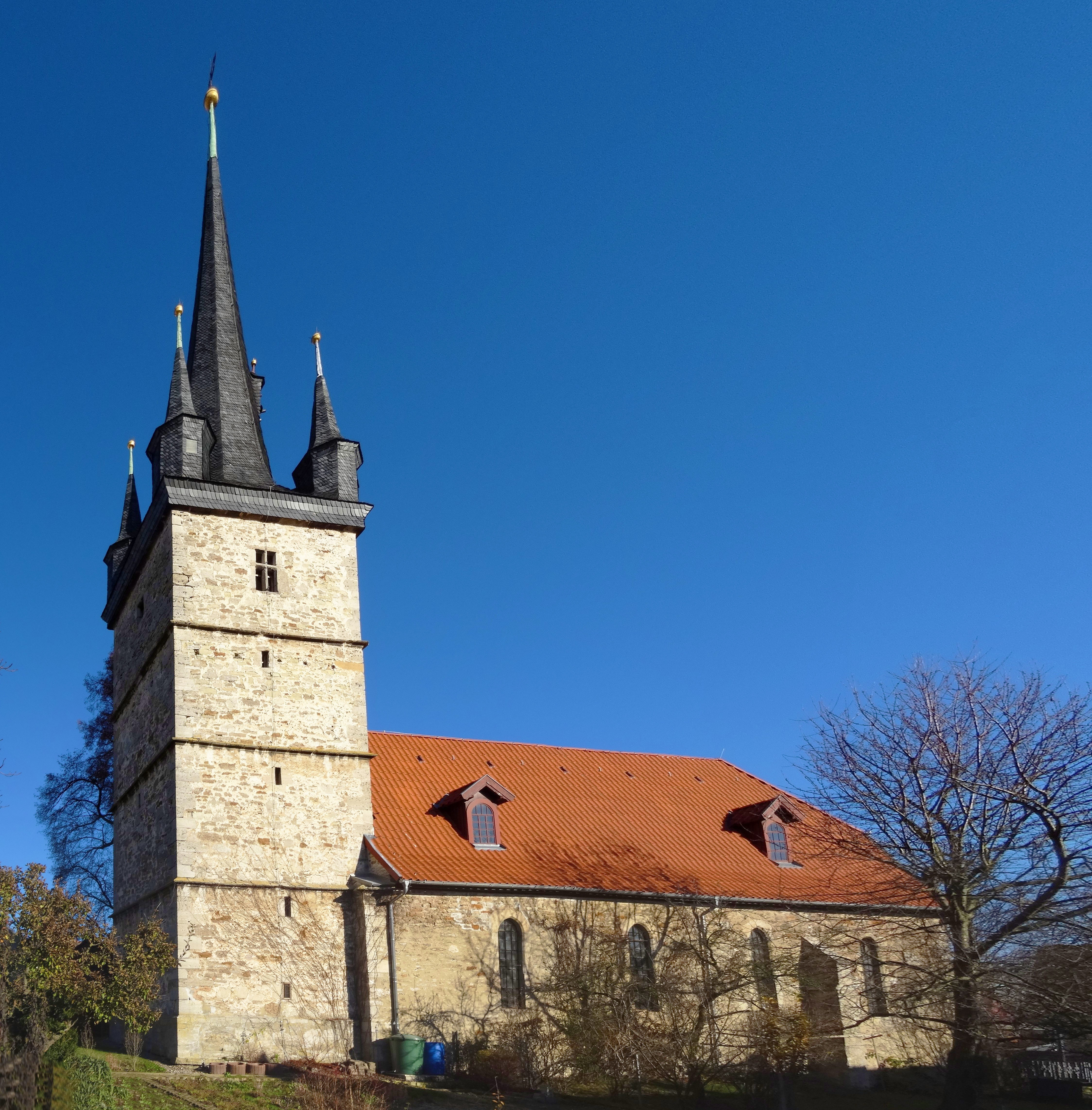 Südansicht Niederspier St. Peter und Paul